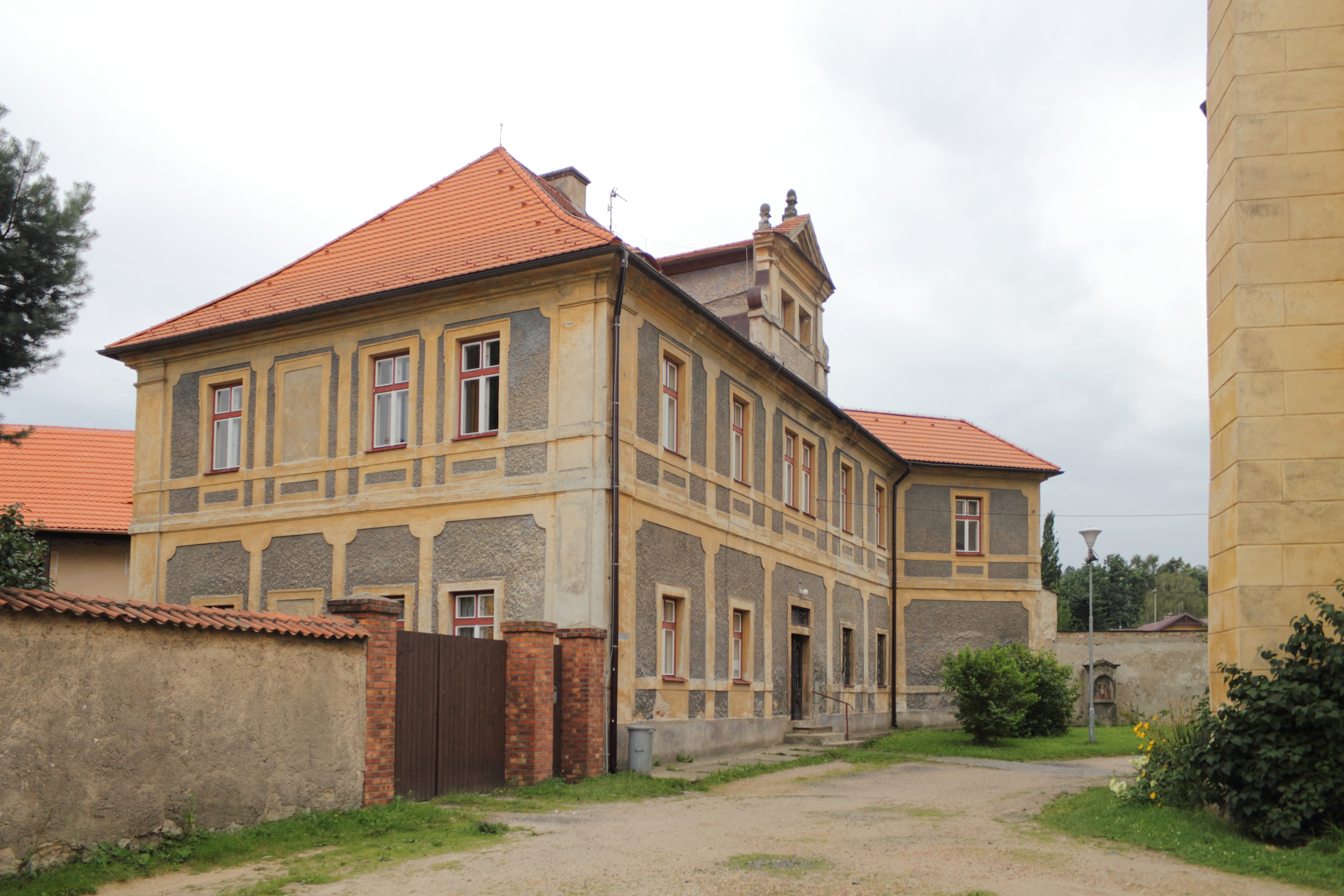 Fara v areálu kostela Nalezení svatého Kříže ve Frýdlantu